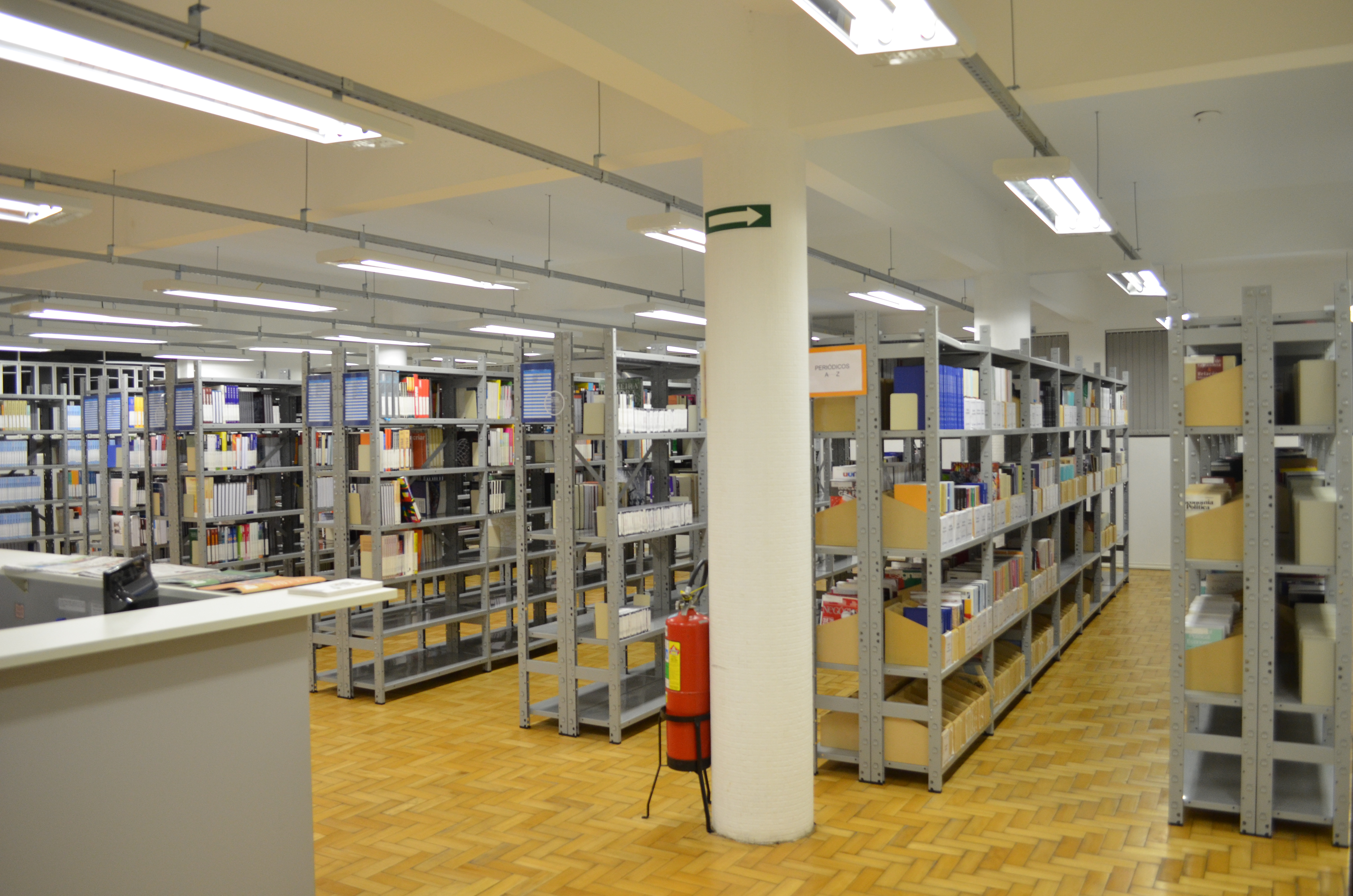 Foto tirada do interior da biblioteca do campus Porto Alegre